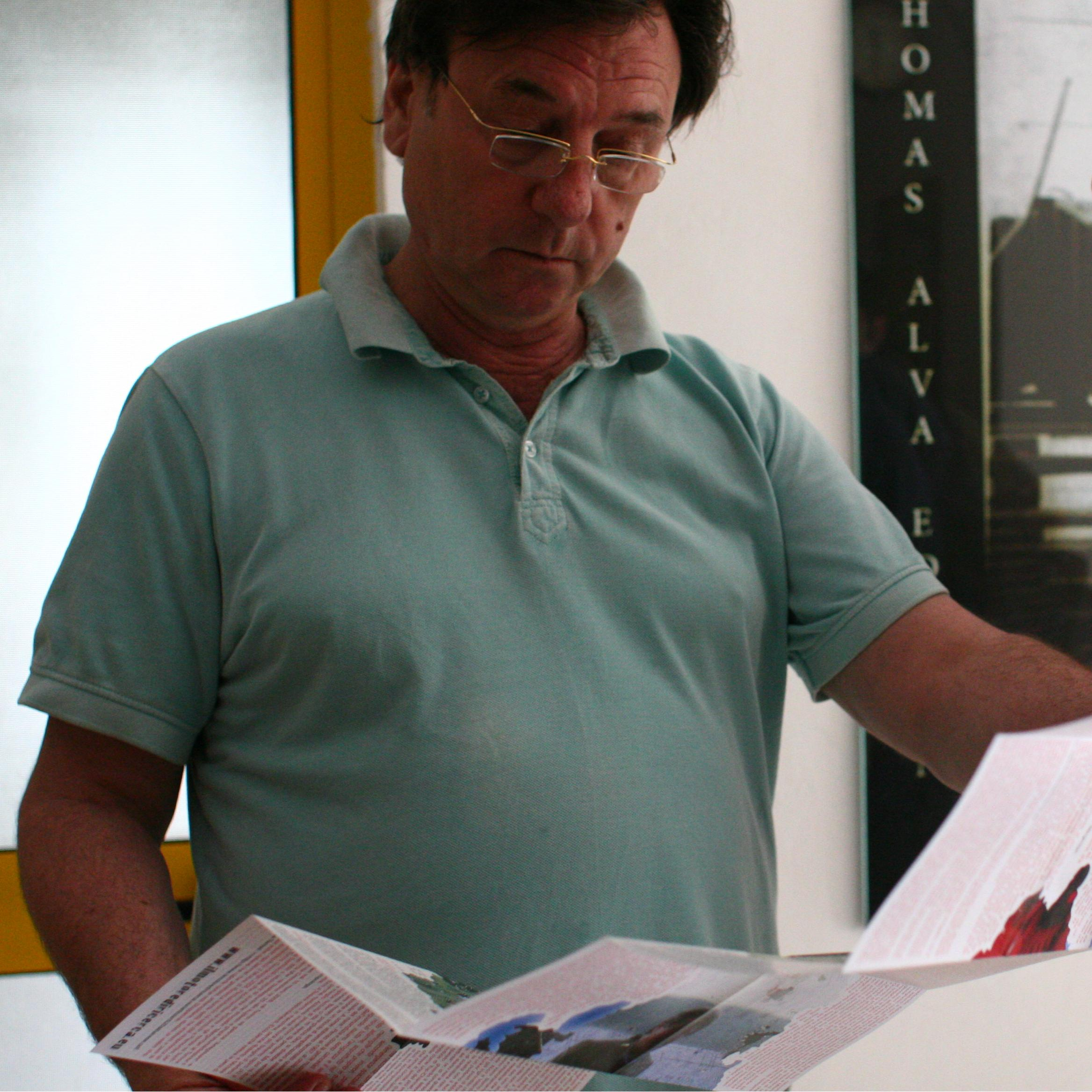 Kujtim çashku, Tirana